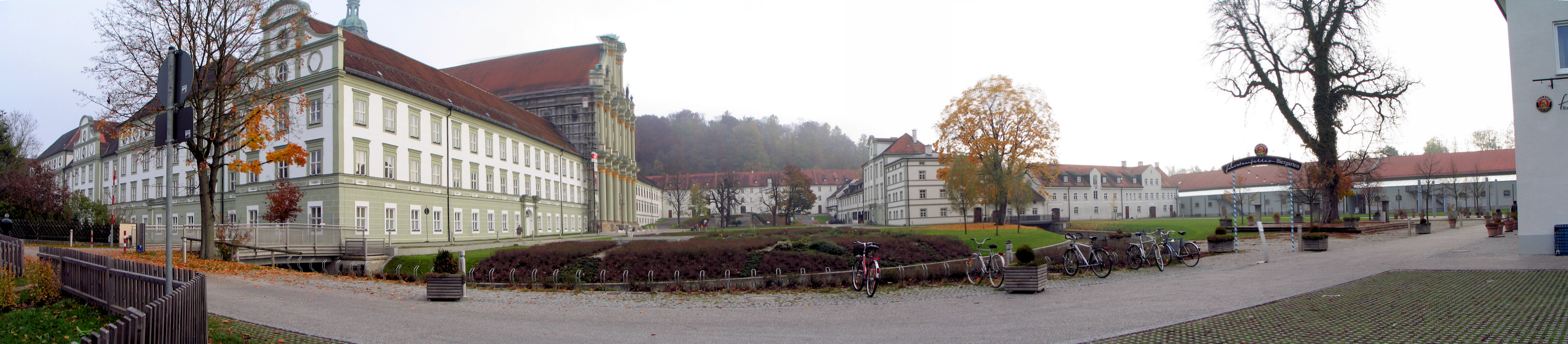 Kloster Fürstenfeld - Panoramaaufnahme.